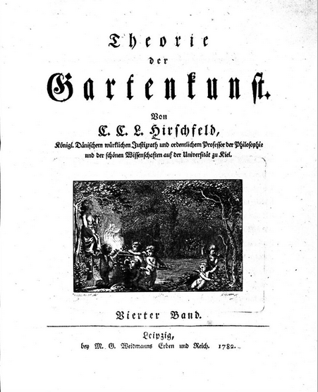 Titelbladet til fjerde bind af C.C.L. Hirschfelds fembindsværk Theorie der Gartenkunst Leipzig, 1779-1785. Tegninger og stik af blandt andre Johann Heinrich Brandt og Christian Gottlieb Geyser